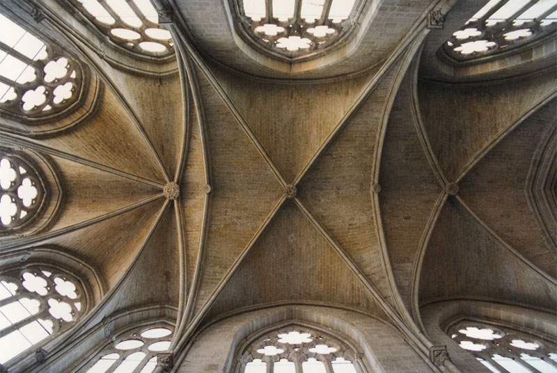 Monestir de Cañas. Voltes de l'església. La Rioja, Espanya